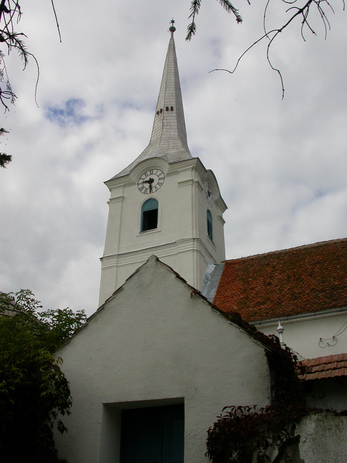 Ansamblul bisericii unitariene, sec. XIV - XVI